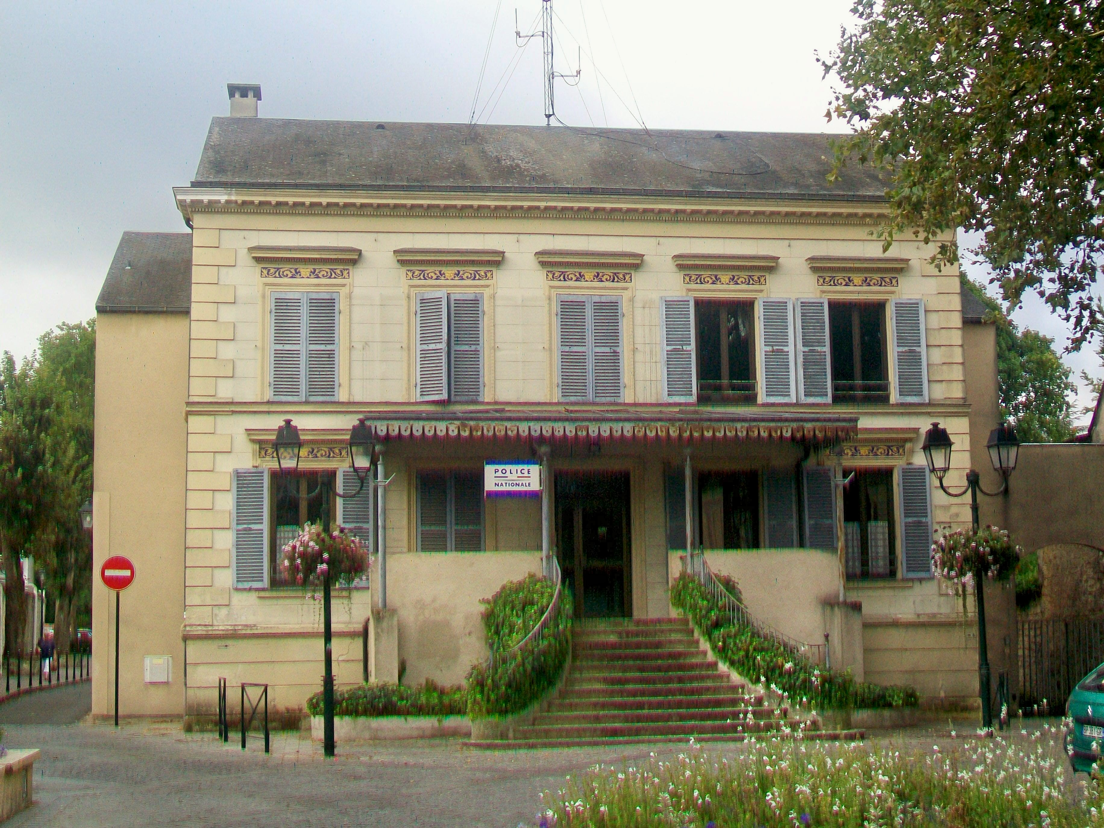 Le commissariat de la Police Nationale, Grande-rue. La maison a été construite en 1900 pour Henri Supplice, le créateur de la plage et de l'office du tourisme de L'Isle-Adam.